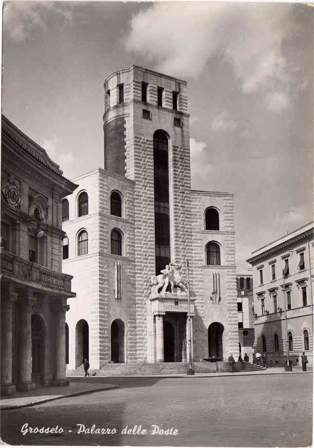 GR Grosseto Palazzo delle Poste